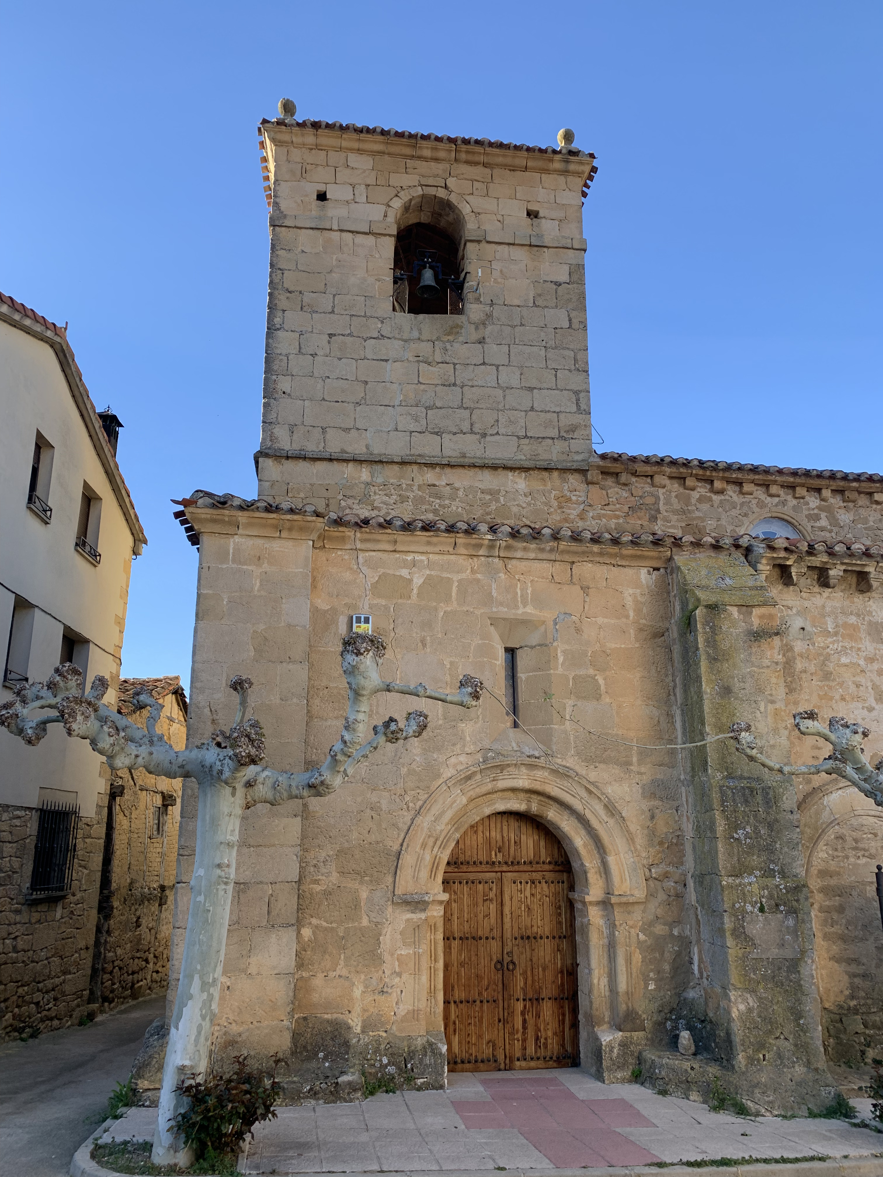 Iglesia de San Miguel de Quintanilla del Coco